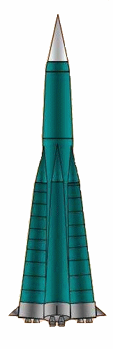 R-7 Interkontinentalrakete, im Westen unter SS-6 bekannt